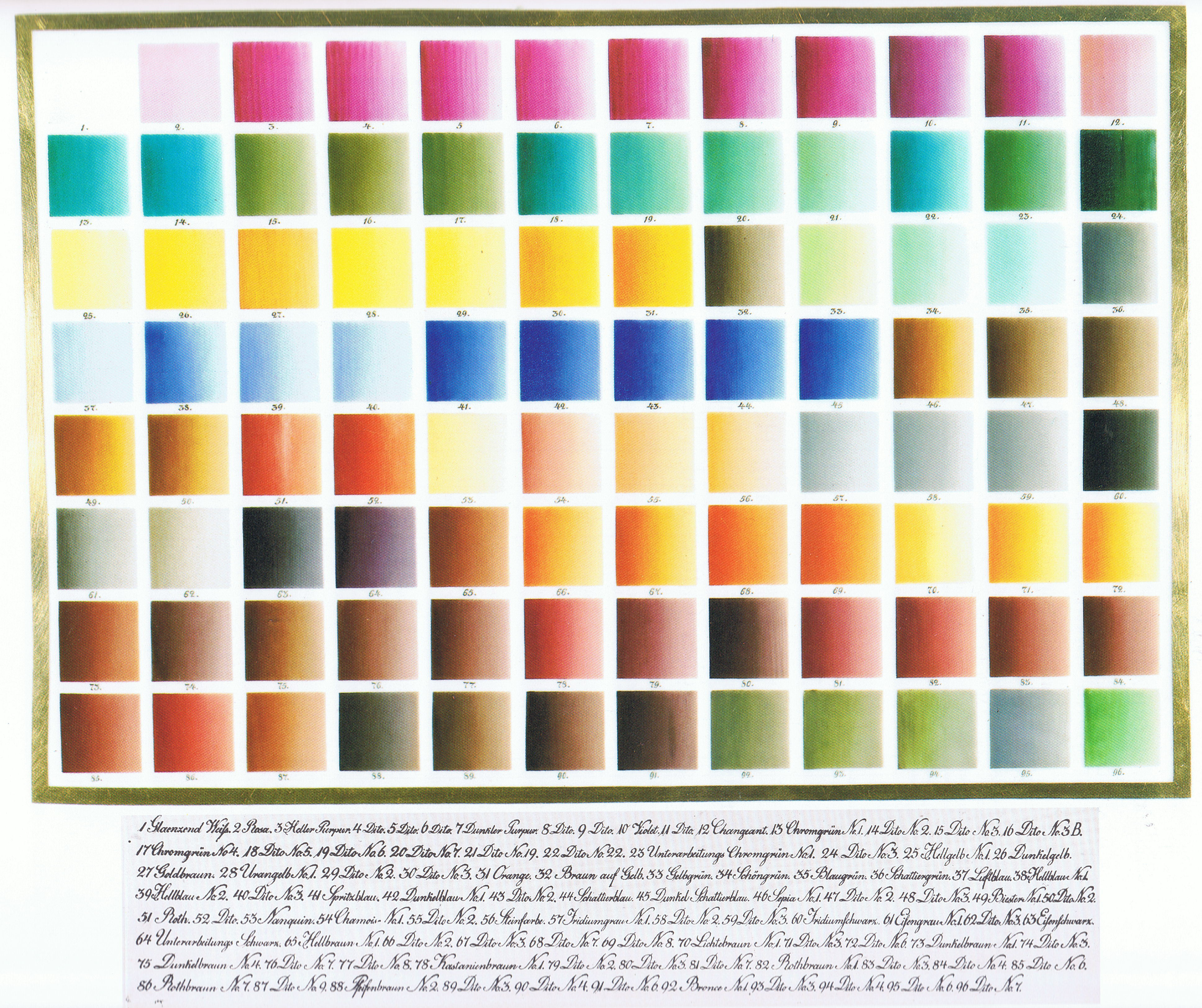 Farbtafel von Georg Frierdrich Christoph Frick, um 1840